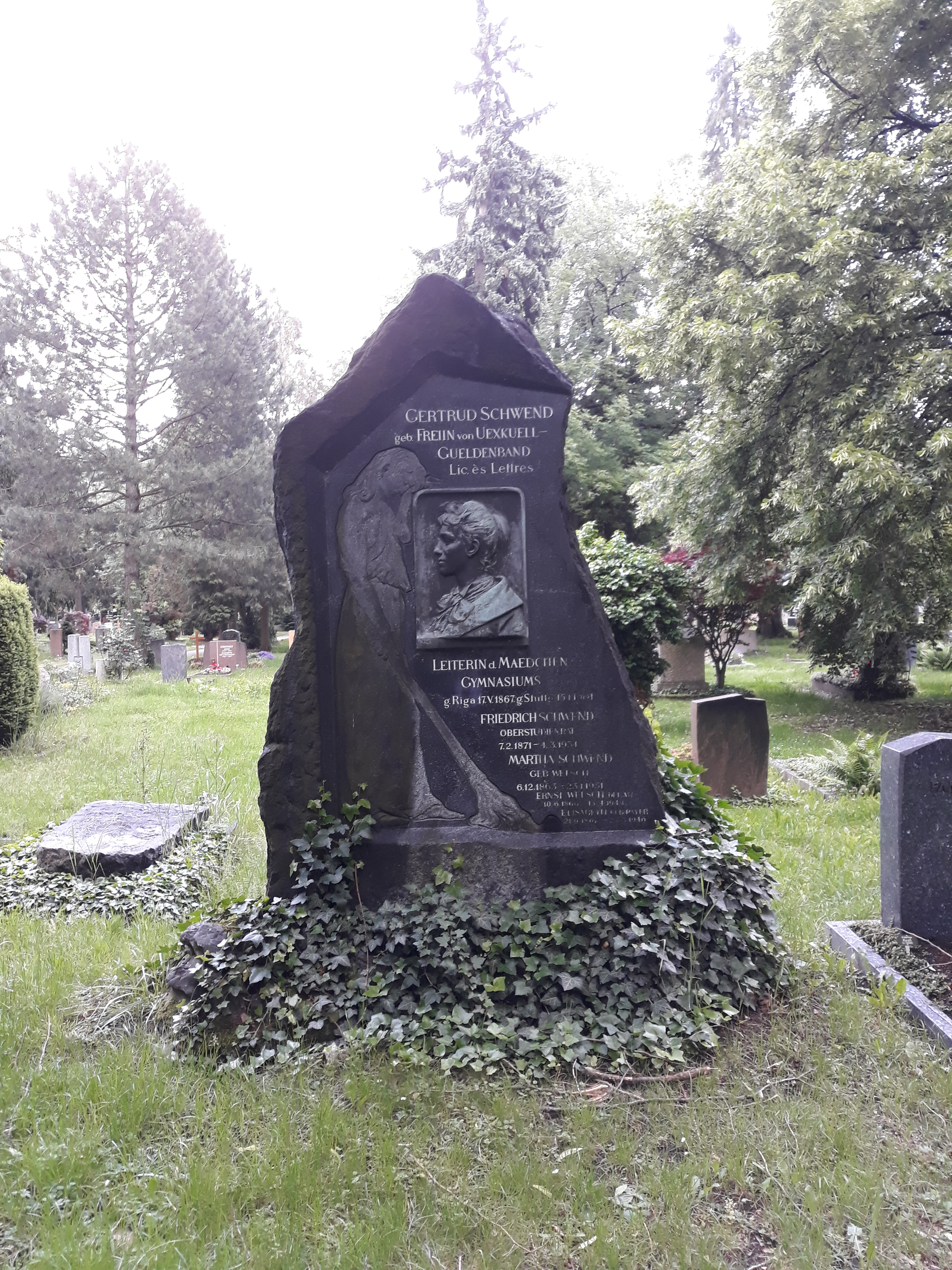 Grab der deutschen Pädagogin Gertrud Schwend (geborene von Uexküll), Pragfriedhof, Stuttgart.